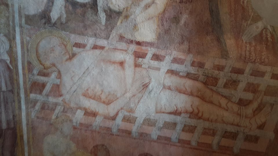 Фреска изображающая мучение св. Лаврентия в старой церкви XII в. церки San lorenzo в Rossino, провинция Lecco, епархия Bergamo